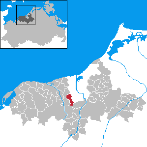 Kritzmow in Mecklenburg-Western Pomerania - District Bad Doberan